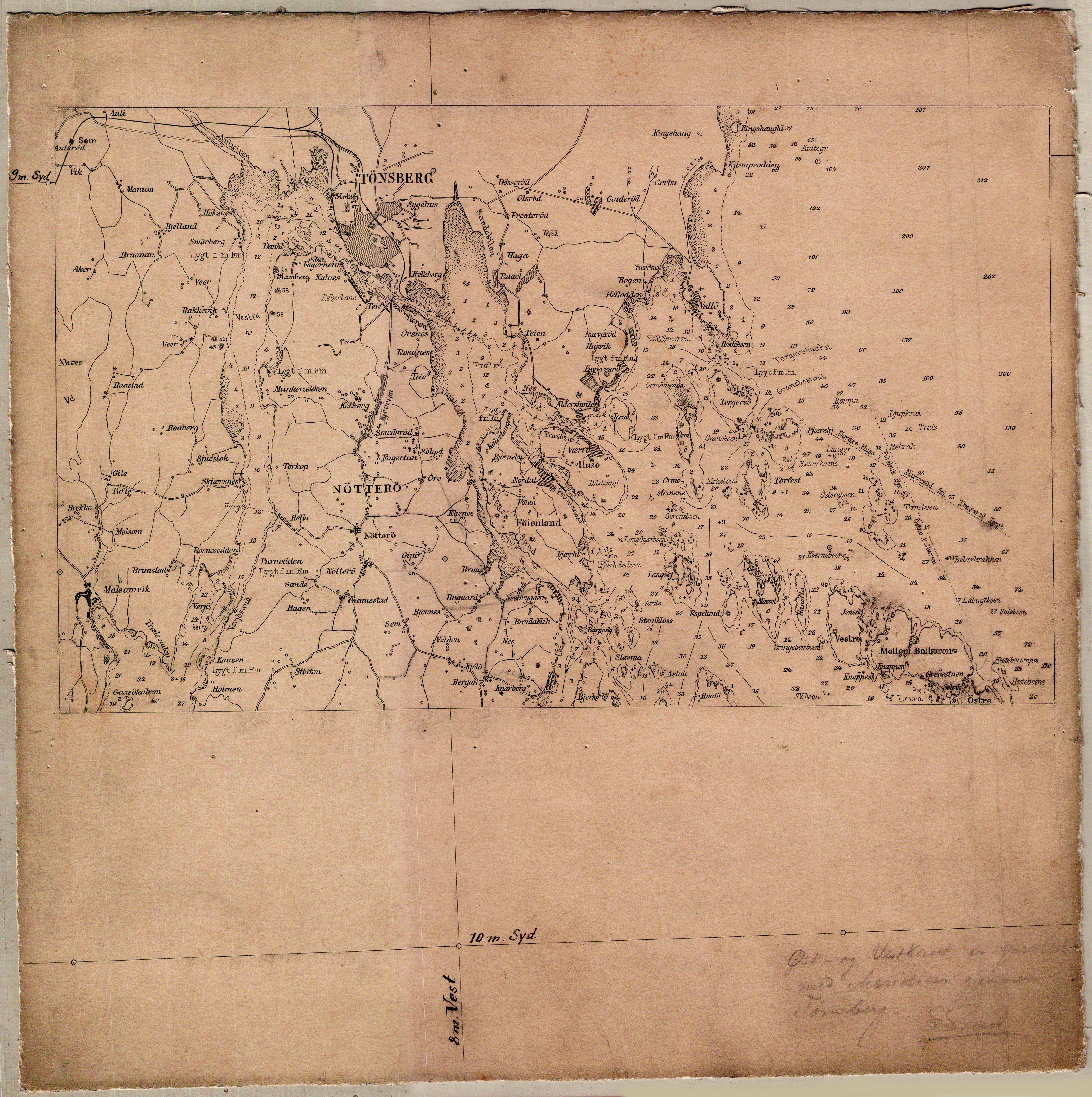 Kart over Tønsberg omegn og kyst fra ukjent årstall. Ukjent målestokk. Original dokumentstørrelse ca 31 cm x 31 cm. Et eksemplar befinner seg hos Statens kartverk Sjø i Stavanger.